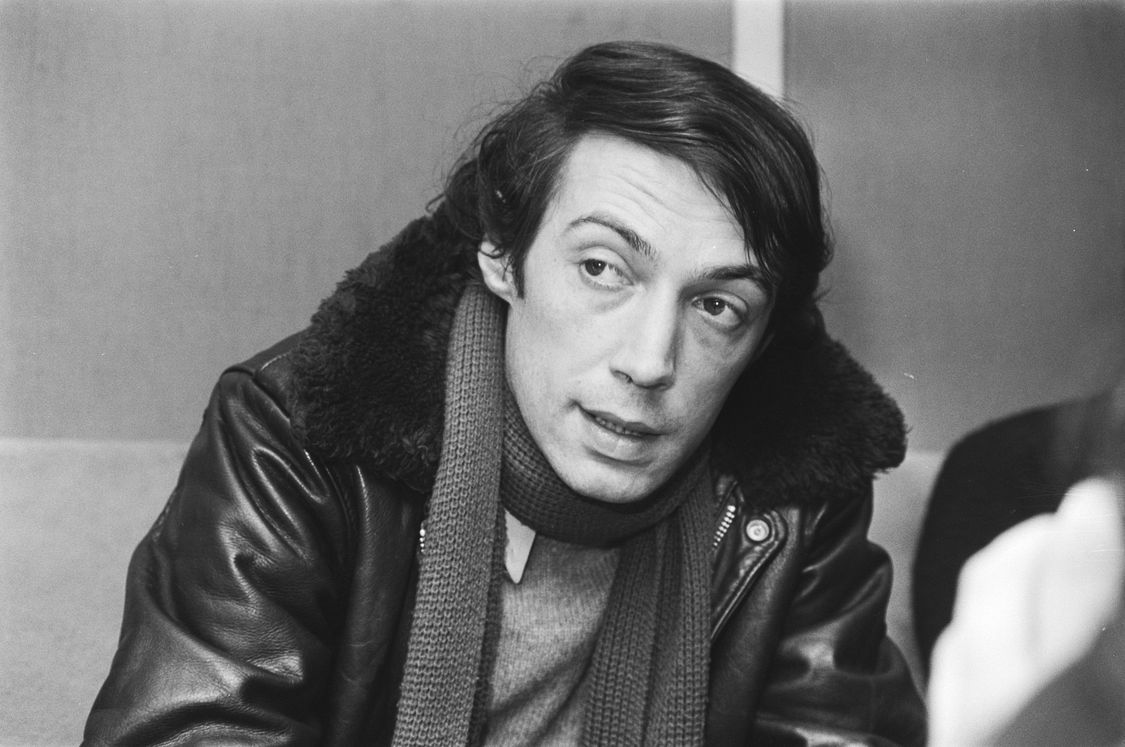 Collectie / Archief : Fotocollectie Anefo Reportage / Serie : [ onbekend ] Beschrijving : Regisseur Andre Techini in Amsterdam n.a.v. opnamen "Barocco", kop Datum : 1 maart 1976 Locatie : Amsterdam, Noord-Holland Trefwoorden : Regisseurs Fotograaf : Mieremet, Rob / Anefo Auteursrechthebbende : Nationaal Archief Materiaalsoort : Negatief (zwart/wit) Nummer archiefinventaris : bekijk toegang 2.24.01.05 Bestanddeelnummer : 928-4416